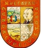 Emblema del municipio de Guadalupe Victoria en Puebla